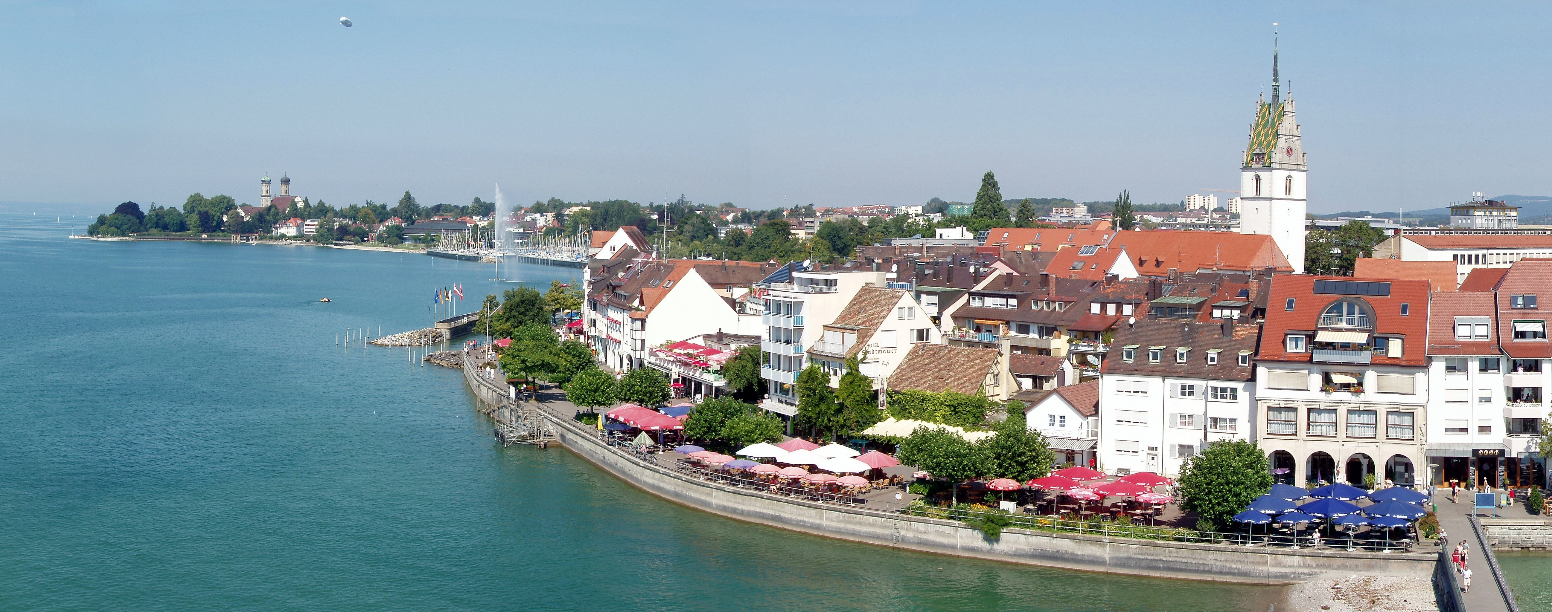 Blick aus dem Aussichtsturm auf die Uferpromenade von Friedrichshafen